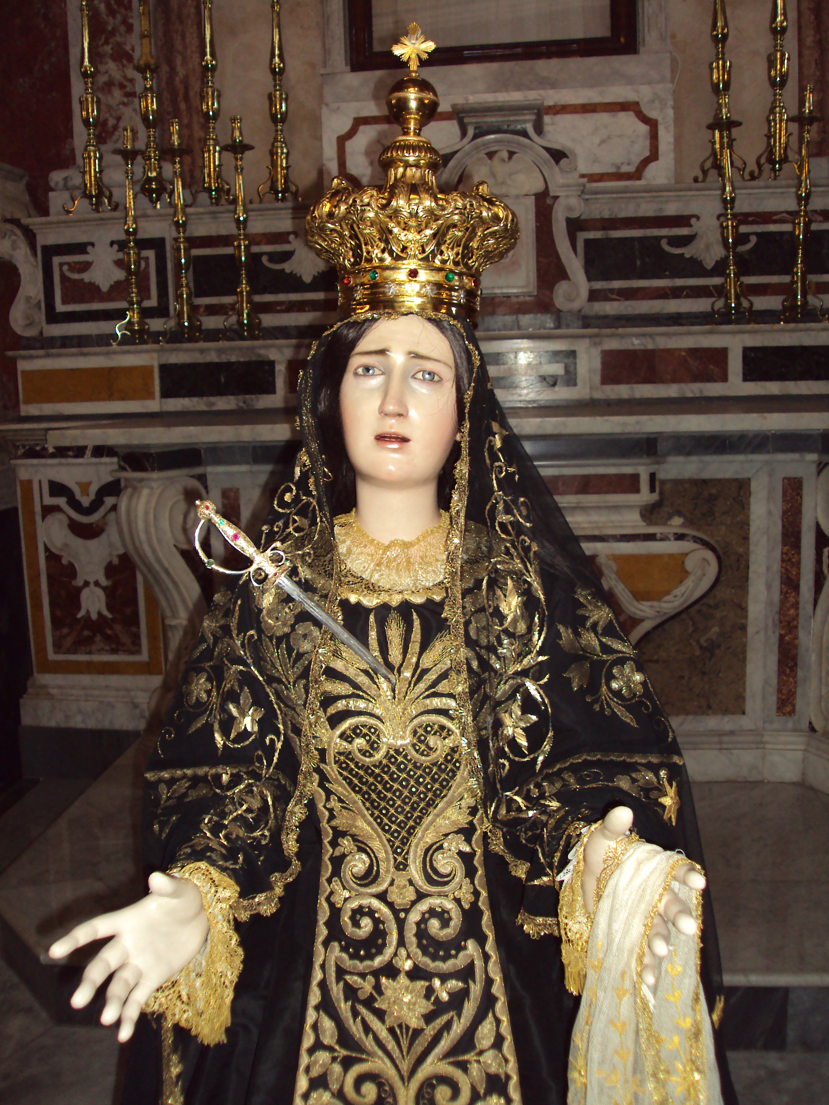 Castellaneta, la statua della Beata Vergine Maria Addolorata.